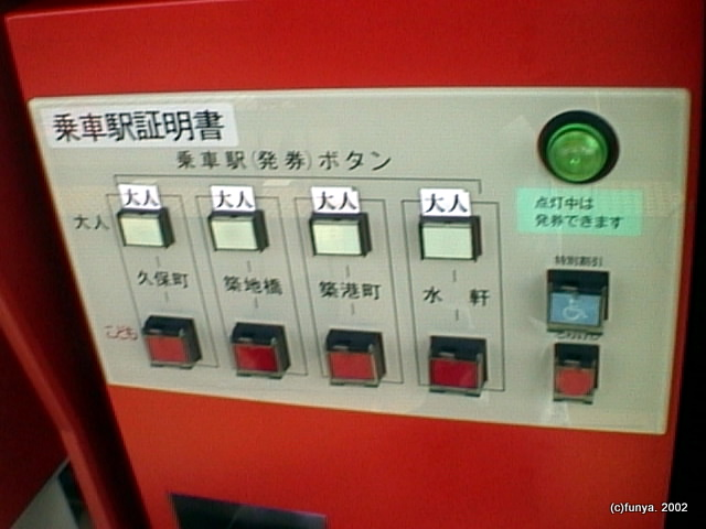 和歌山港線水軒健在末期のもの。